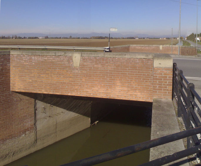 Ponte della Botta sul canale "Vampadore" lungo la Strada Provinciale n.18 nella Bassa Padovana